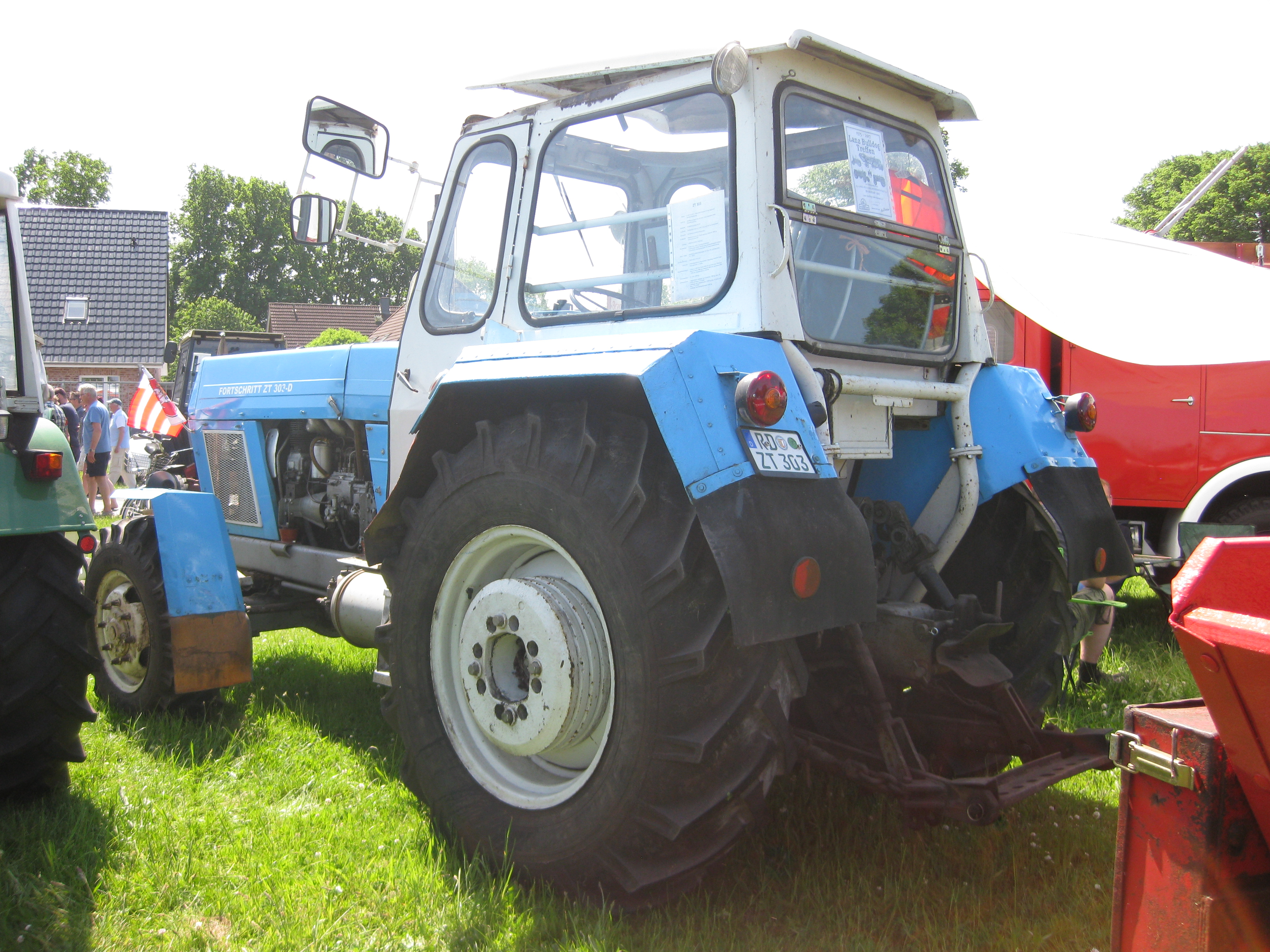 Traktor Fortschritt ZT 303 Heckansicht